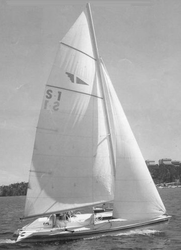 Svartvit bild på segelbåtstypen Flyer